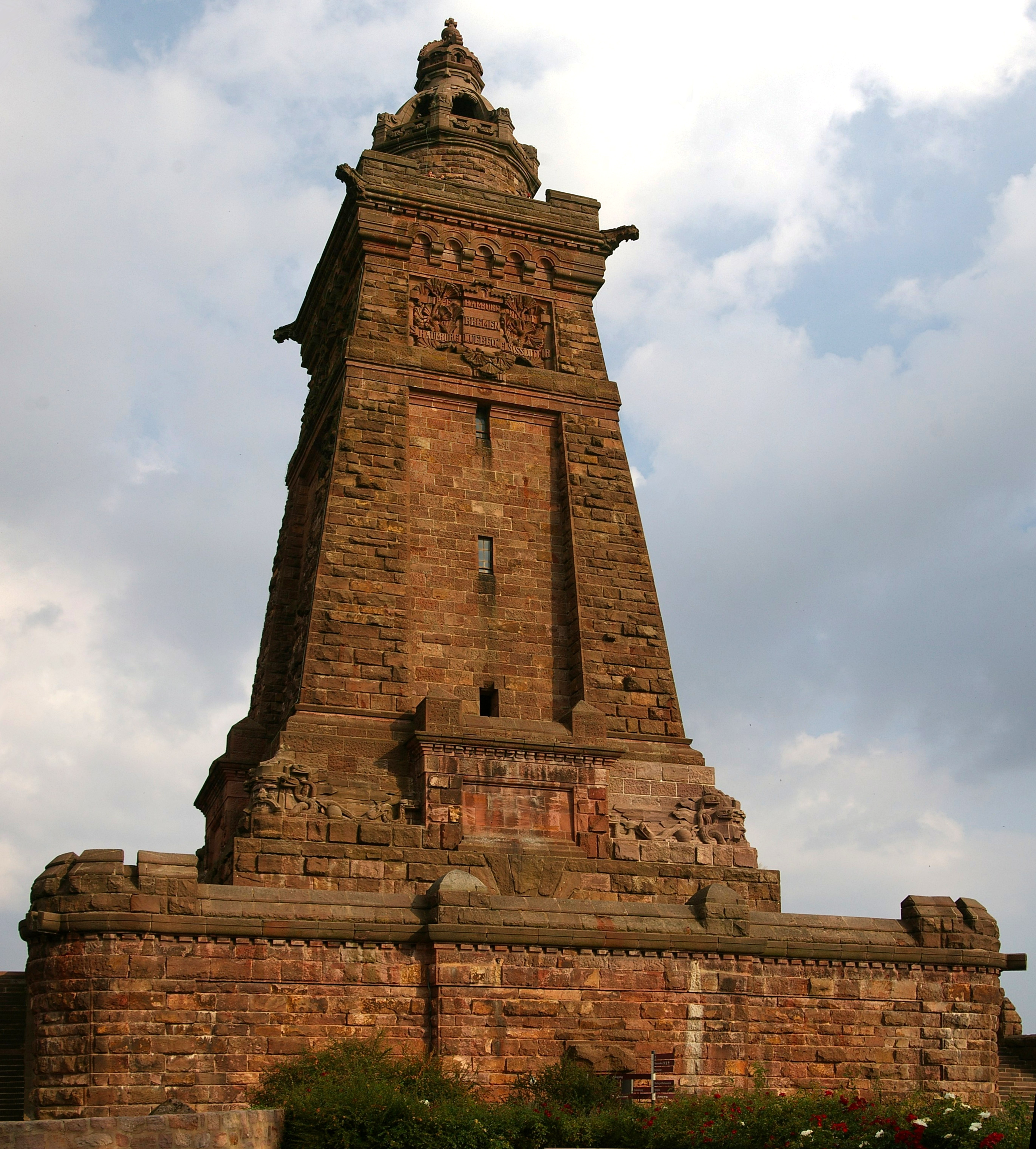 Kyffhäuser-Denkmal - Vertikalpanorama - Turm